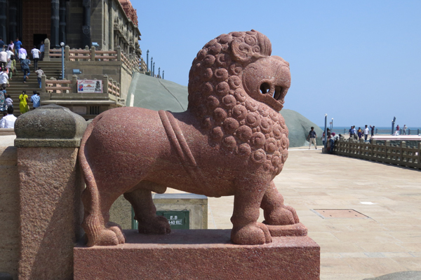 சிங்கத்தின் உருவில் சிலை